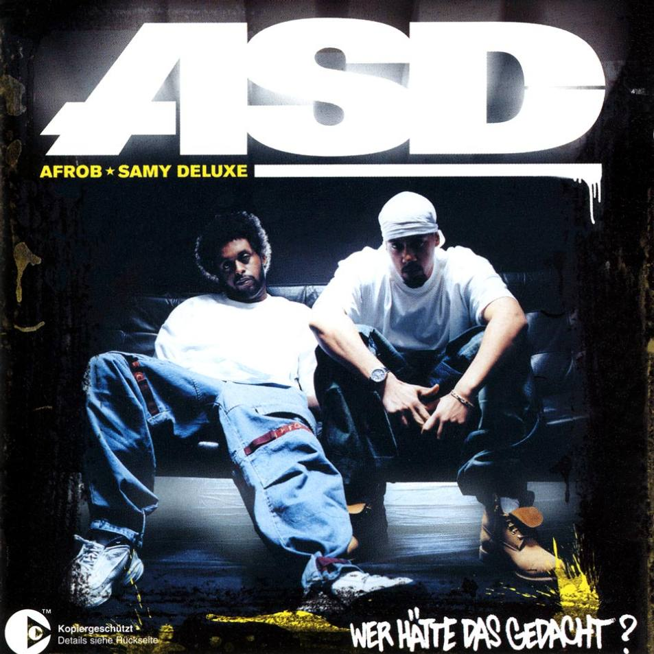 Cover des Albums „Wer hätte das gedacht?“